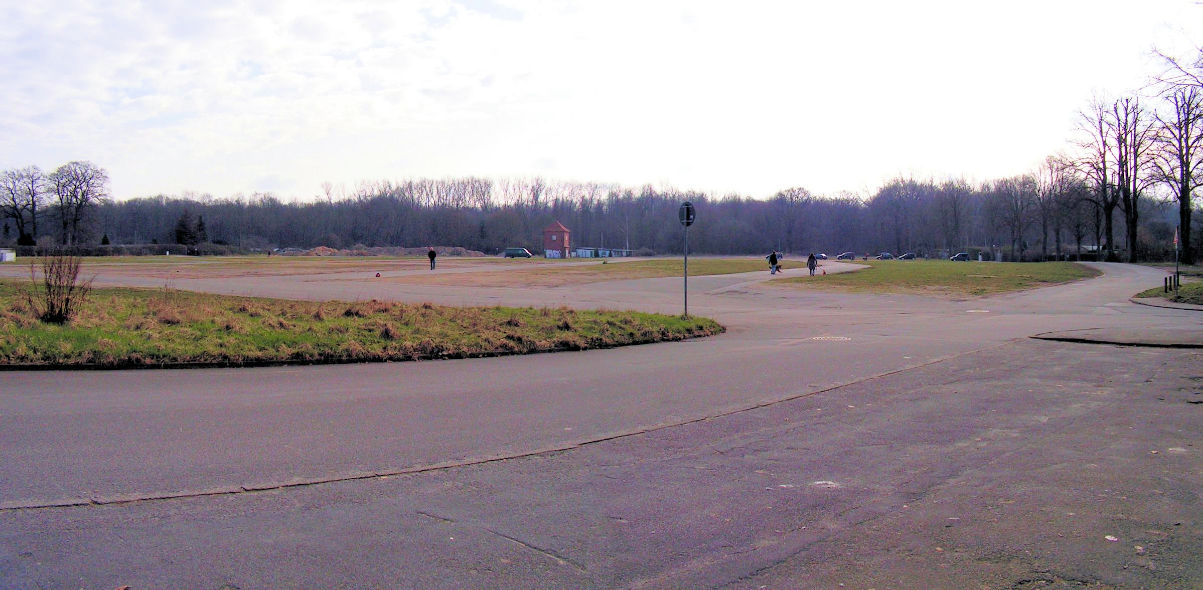 Lübeck/Volksfestplatz, im Hintergrund das Lauerholz